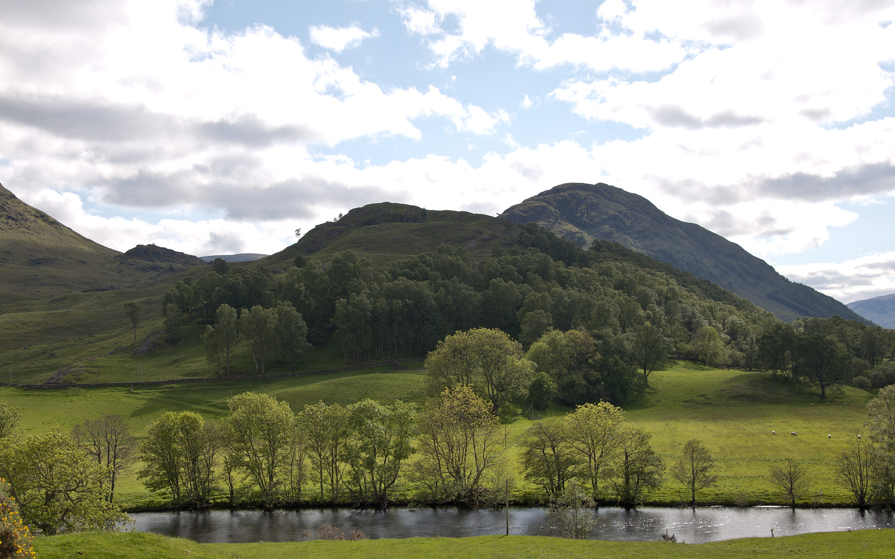 Glen Lyon, tussen Bridge of Balgie en Invervar, in zuidelijke richting, Perth and Kinross, Schotland